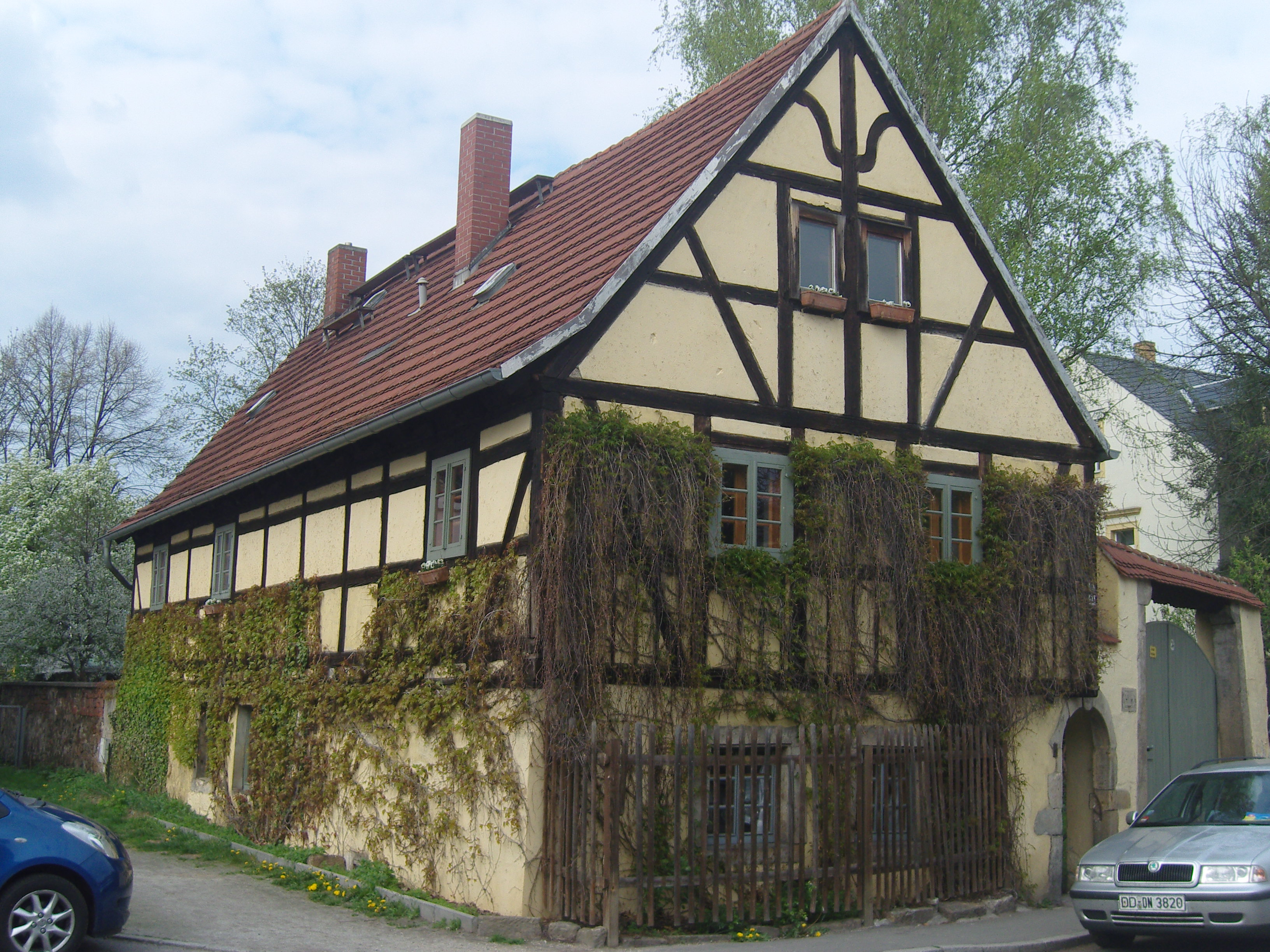 Denkmalgeschütztes Wohnhaus in der Robert-Matzke-Straße 34 in Dresden Pieschen